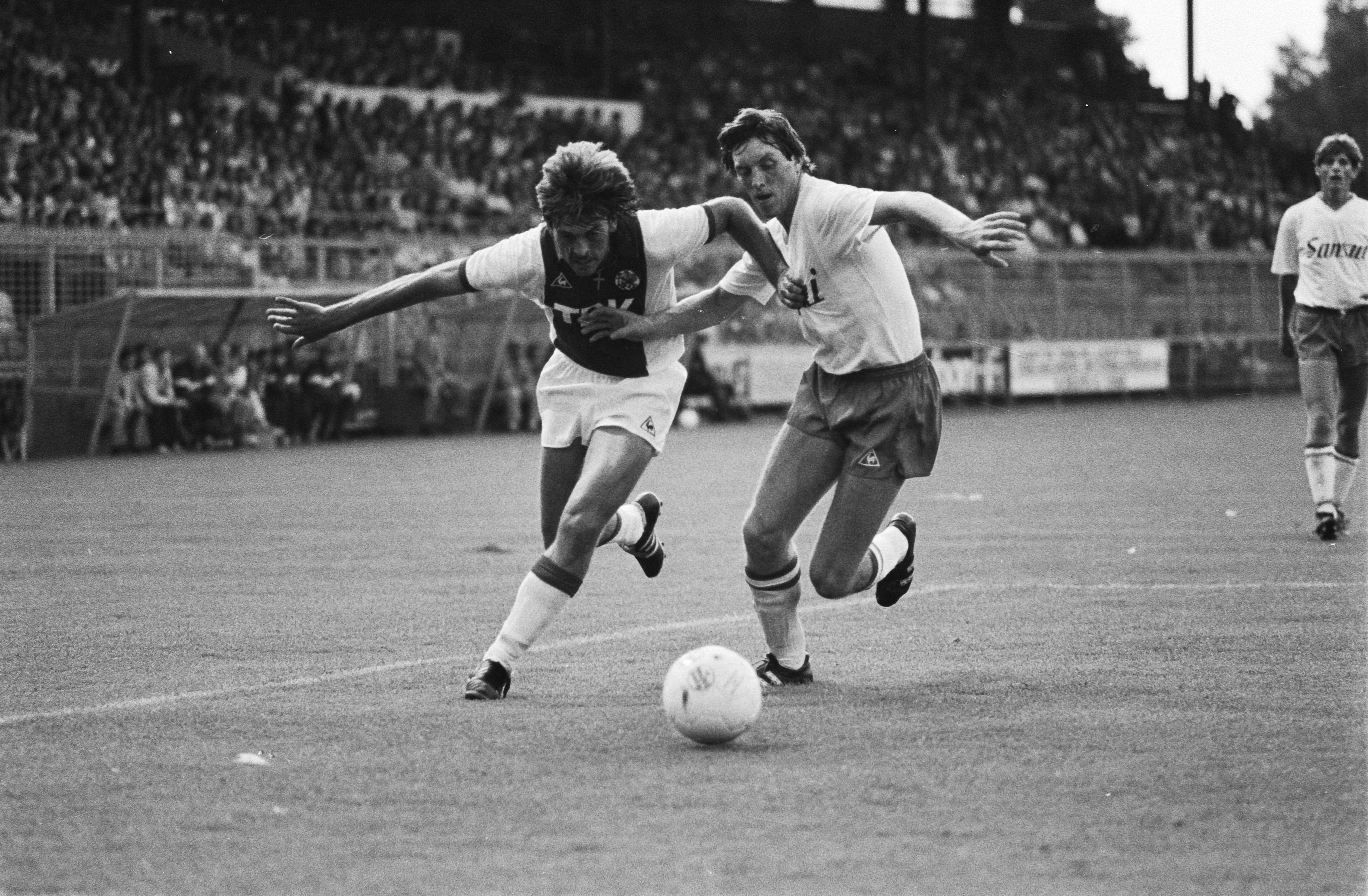 Collectie / Archief : Fotocollectie Anefo Reportage / Serie : [ onbekend ] Beschrijving : Ajax tegen Willem II ; Gasselich (links) in duel met een Willem II speler Datum : 24 augustus 1983 Locatie : Amsterdam, Noord-Holland Trefwoorden : voetbal, wedstrijden Persoonsnaam : Gasselich, Felix Instellingsnaam : Willem II Fotograaf : Antonisse, Marcel / Anefo Auteursrechthebbende : Nationaal Archief Materiaalsoort : Negatief (zwart/wit) Nummer archiefinventaris : bekijk toegang 2.24.01.05 Bestanddeelnummer : 932-6748